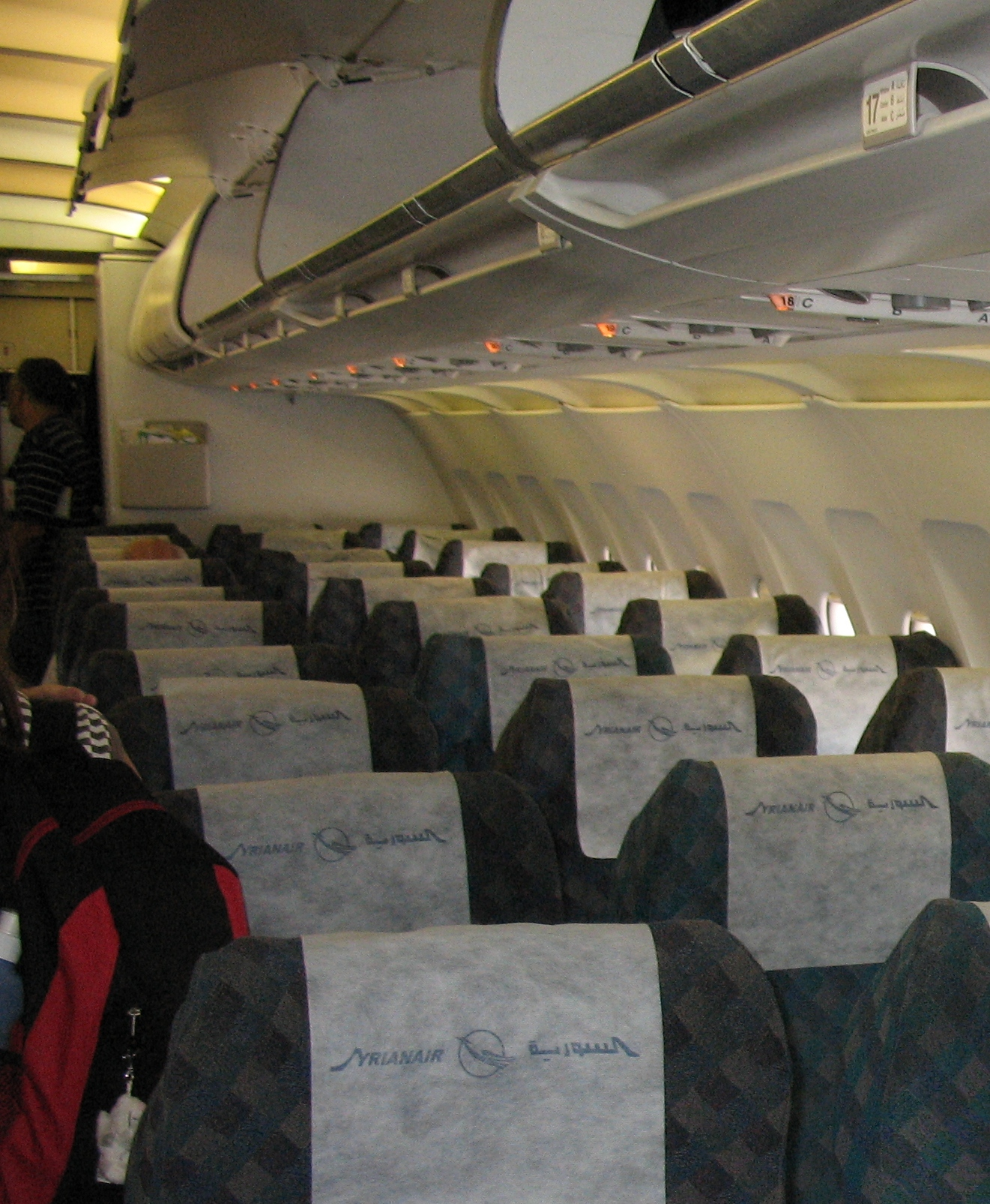 Innengestaltung im Flieger der Gesellschaft "Syrian Arab Airlines"